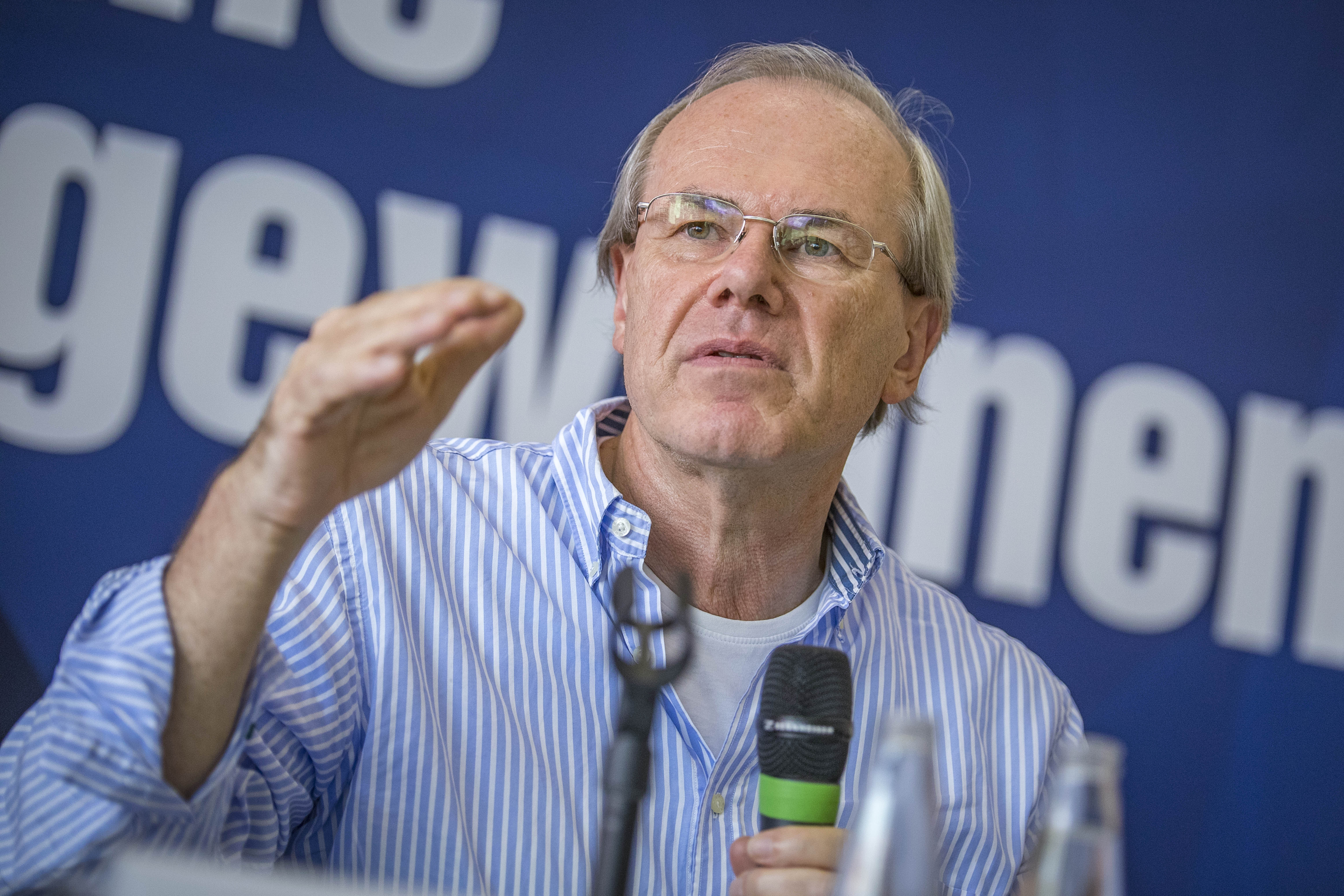 Abschlusspodium der Linken Woche der Zukunft: "Wie wir die Zukunft gewinnen" Mit Katja Kipping (Parteivorsitzende DIE LINKE), Nick Srnicek (King’s College London, Autor von "Plattformkapitalismus") und Alex Demirovic (Prof. an der Goethe-Universität, Vorsitzender des wissenschaftlichen Beirats der Rosa-Luxemburg-Stiftung). Moderation Nelly Tügel (Redakteurin des neuen deutschlands für Politik und Wirtschaft in der EU)